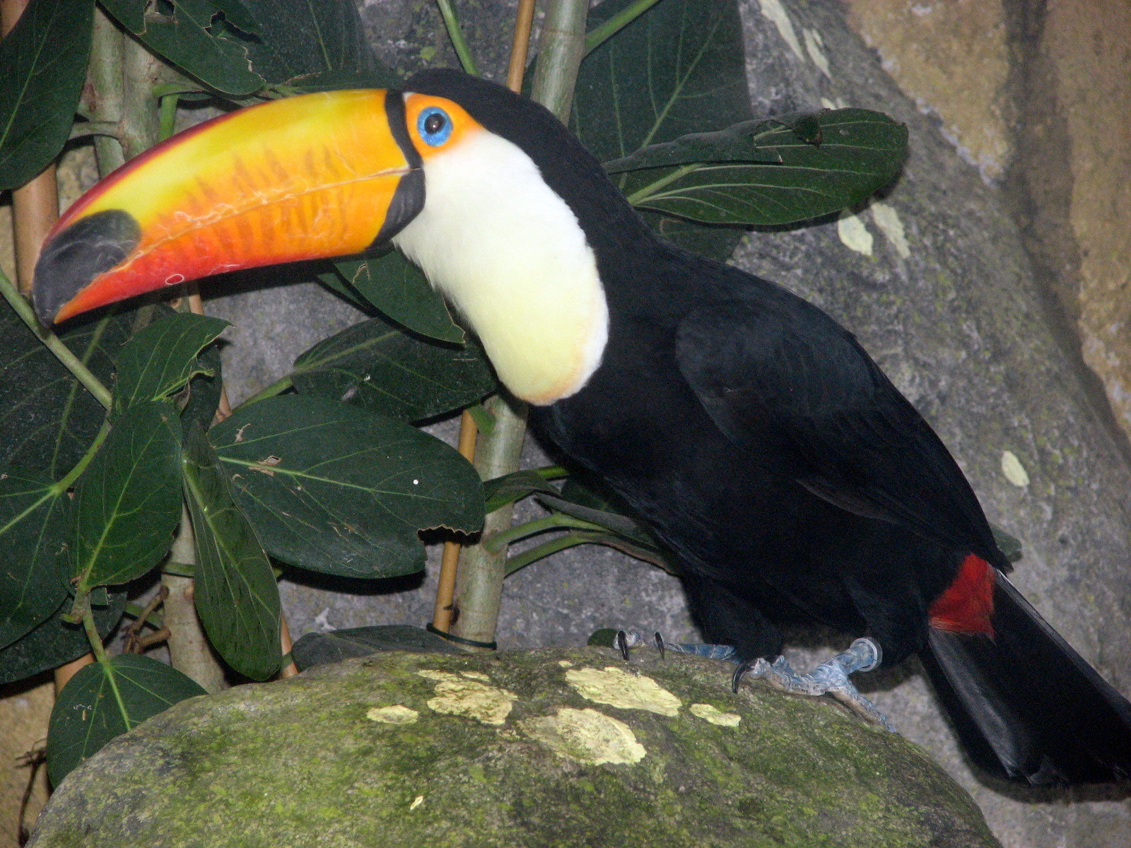 Reuzentoekan, Toco Toucan, Ramphastos toco, Diergaarde Blijdorp Rotterdam, december 2007